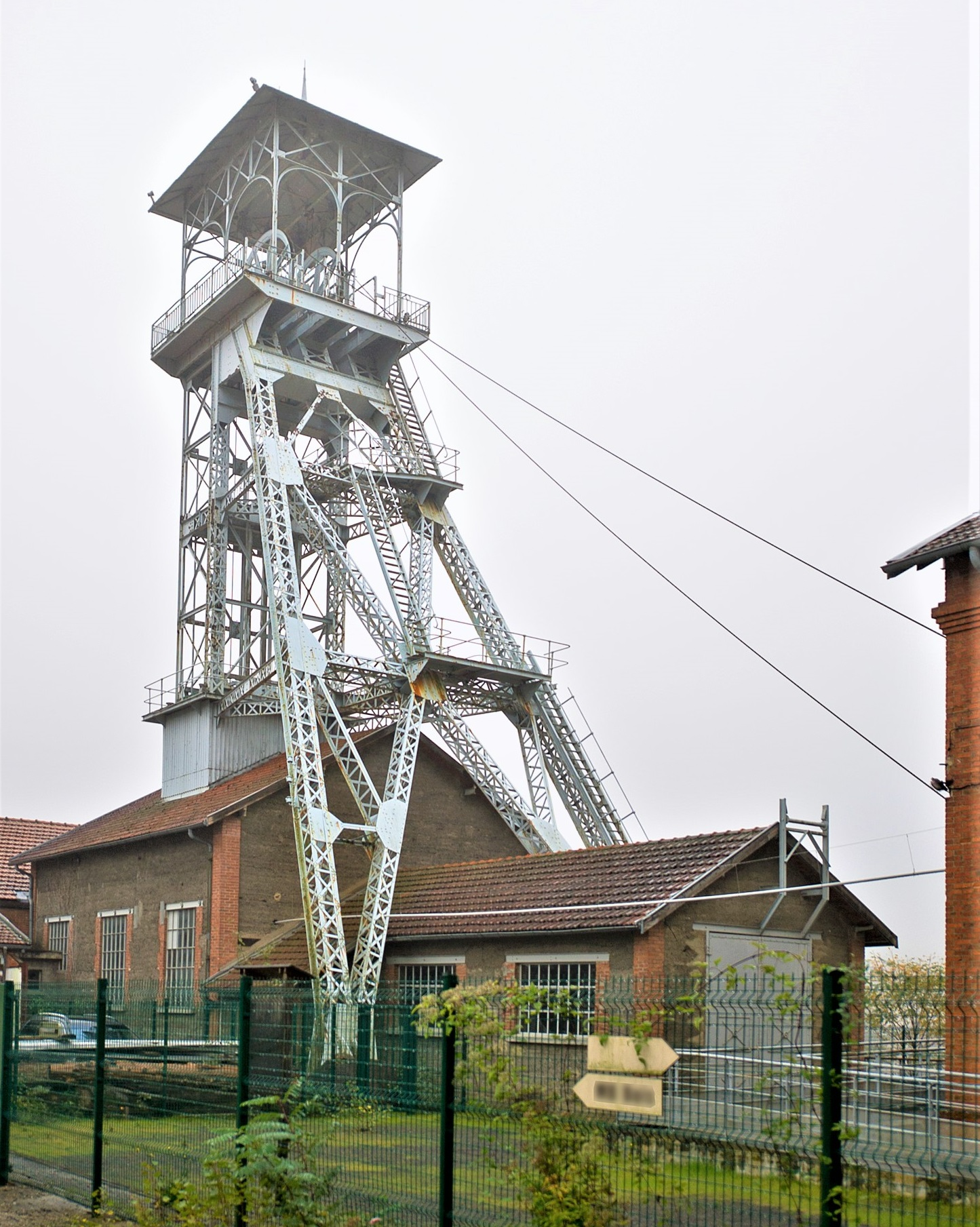 Puits Perret, chemin du Puits-Perret (Inscrit, 2010) .